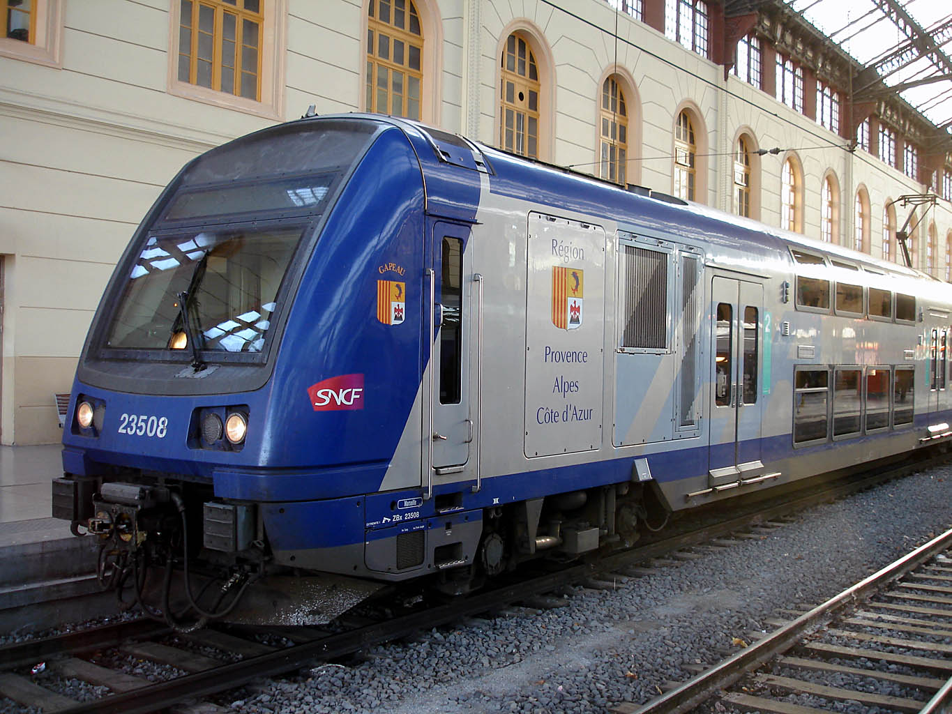 Z 23500 en gare de Marseille-Saint-Charles, France.